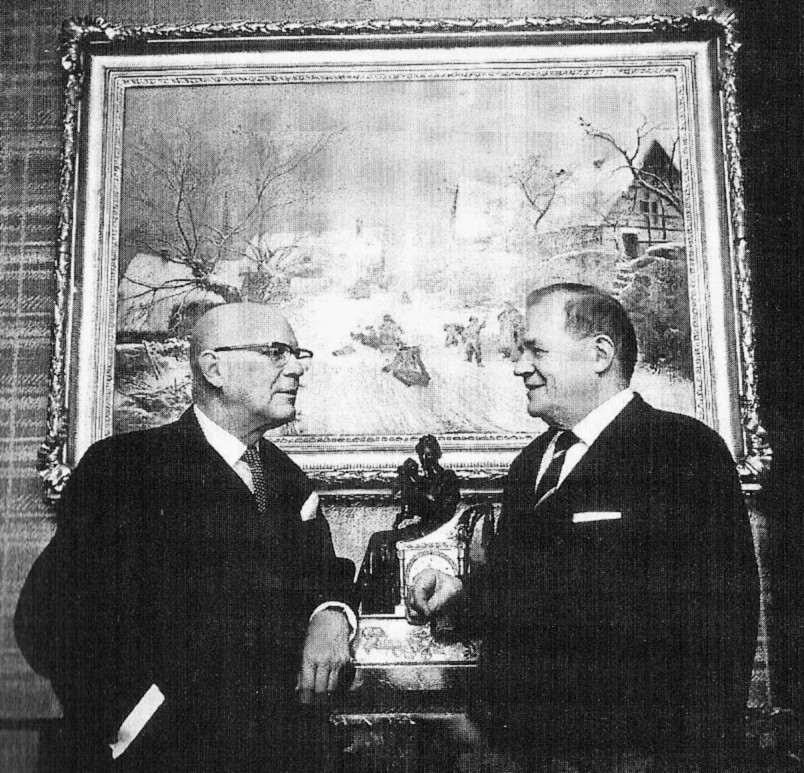 Urho Kekkonen ja Kustaa Vilkuna.